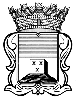 Stemma del Comune di Tricesimo adottato durante il XX secolo.